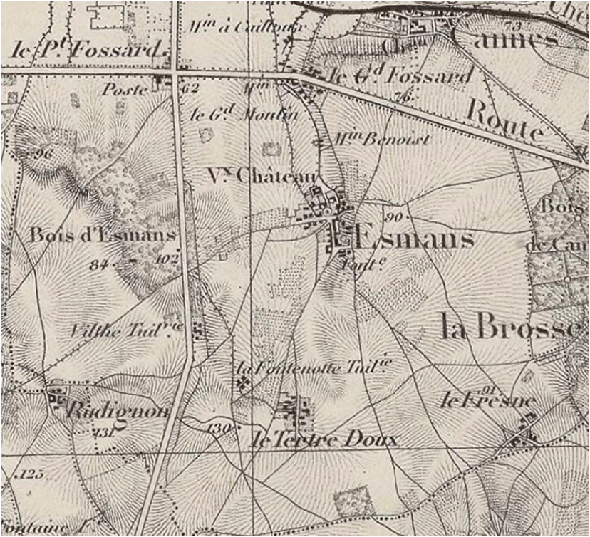 Zone selectionnée de la carte du chemin de fer de Montereau à Troyes. 1 : 80 000 / Par Pernelle